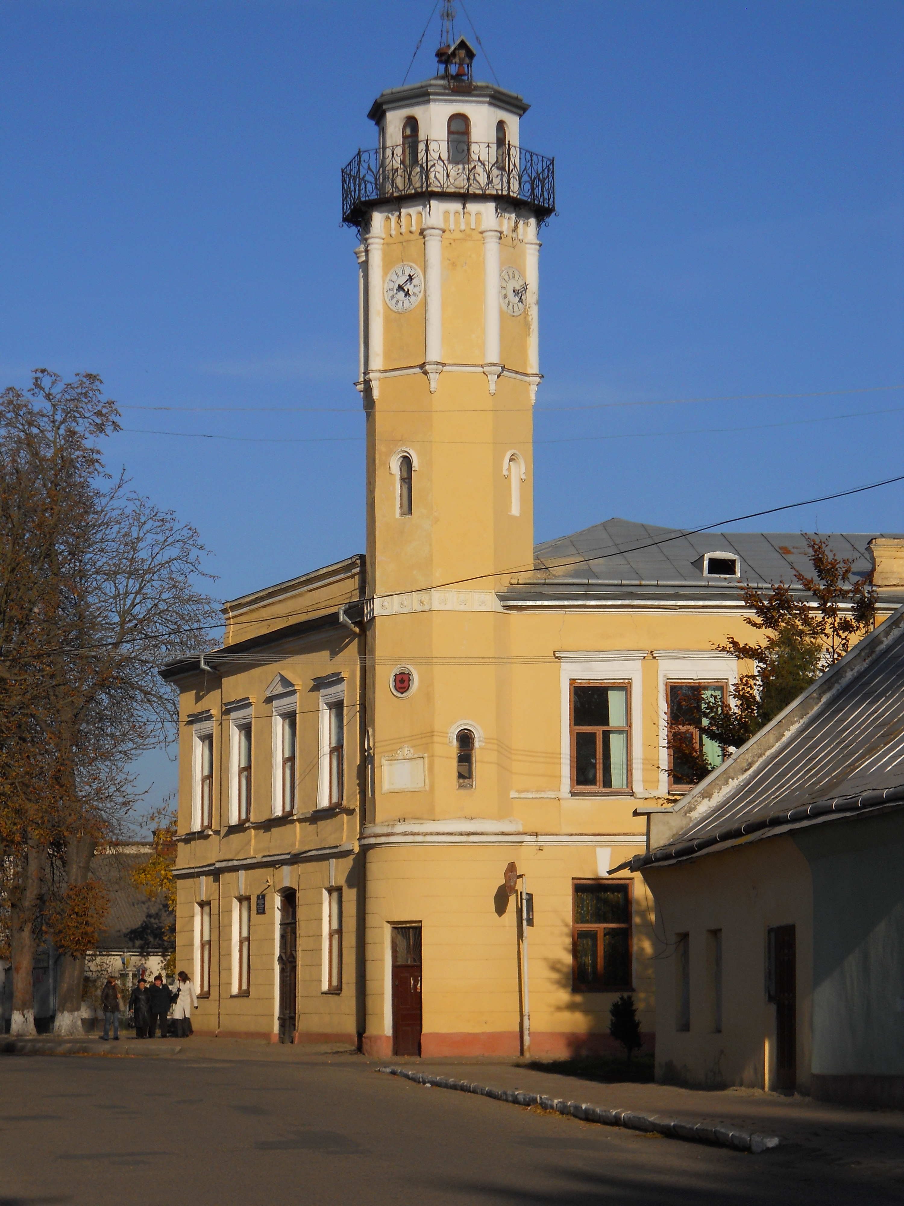 Ратуша, Яворів, вул.Львівська,20